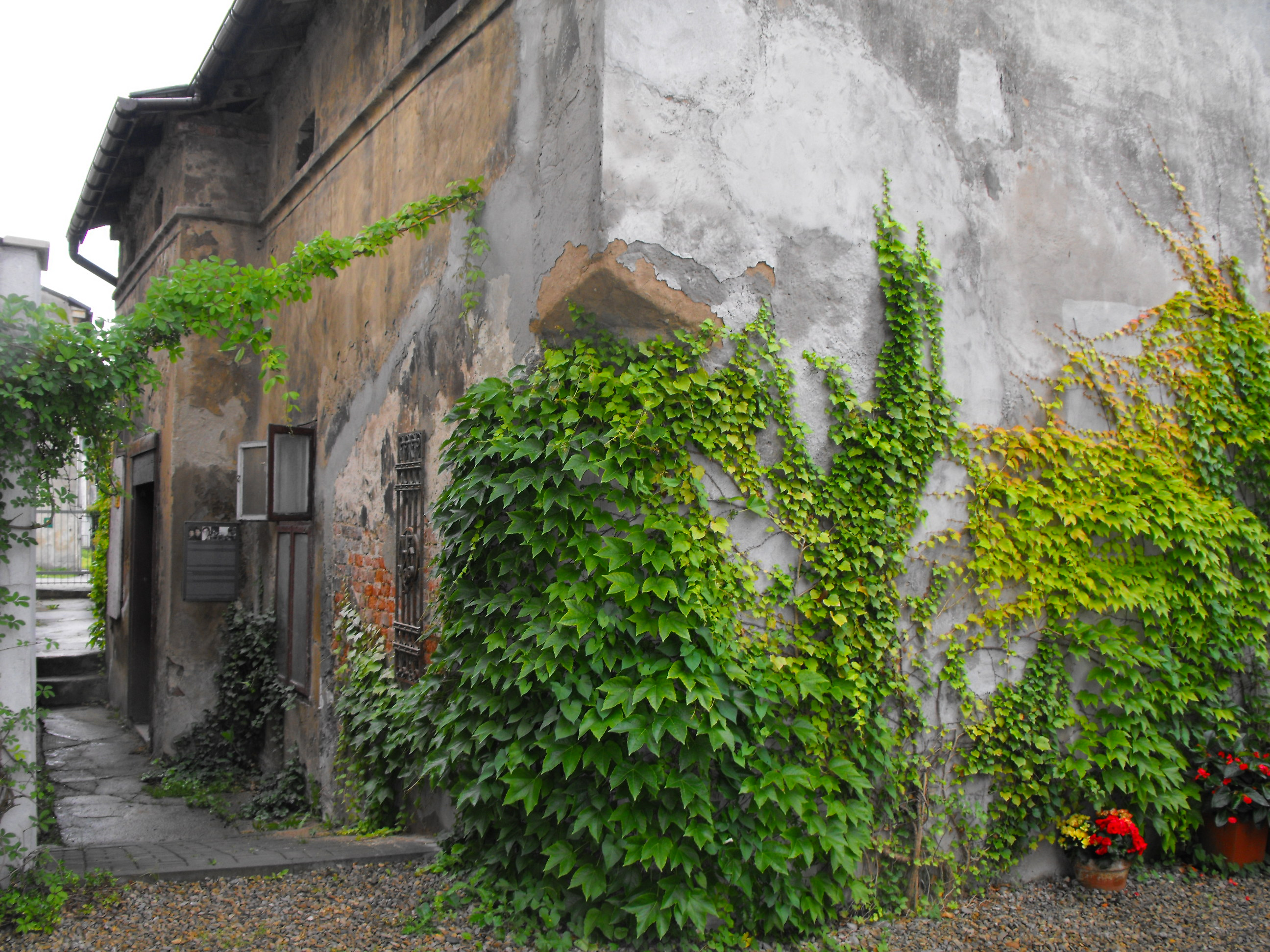 Дом Шимона Клугера - последнего еврея Освенцима